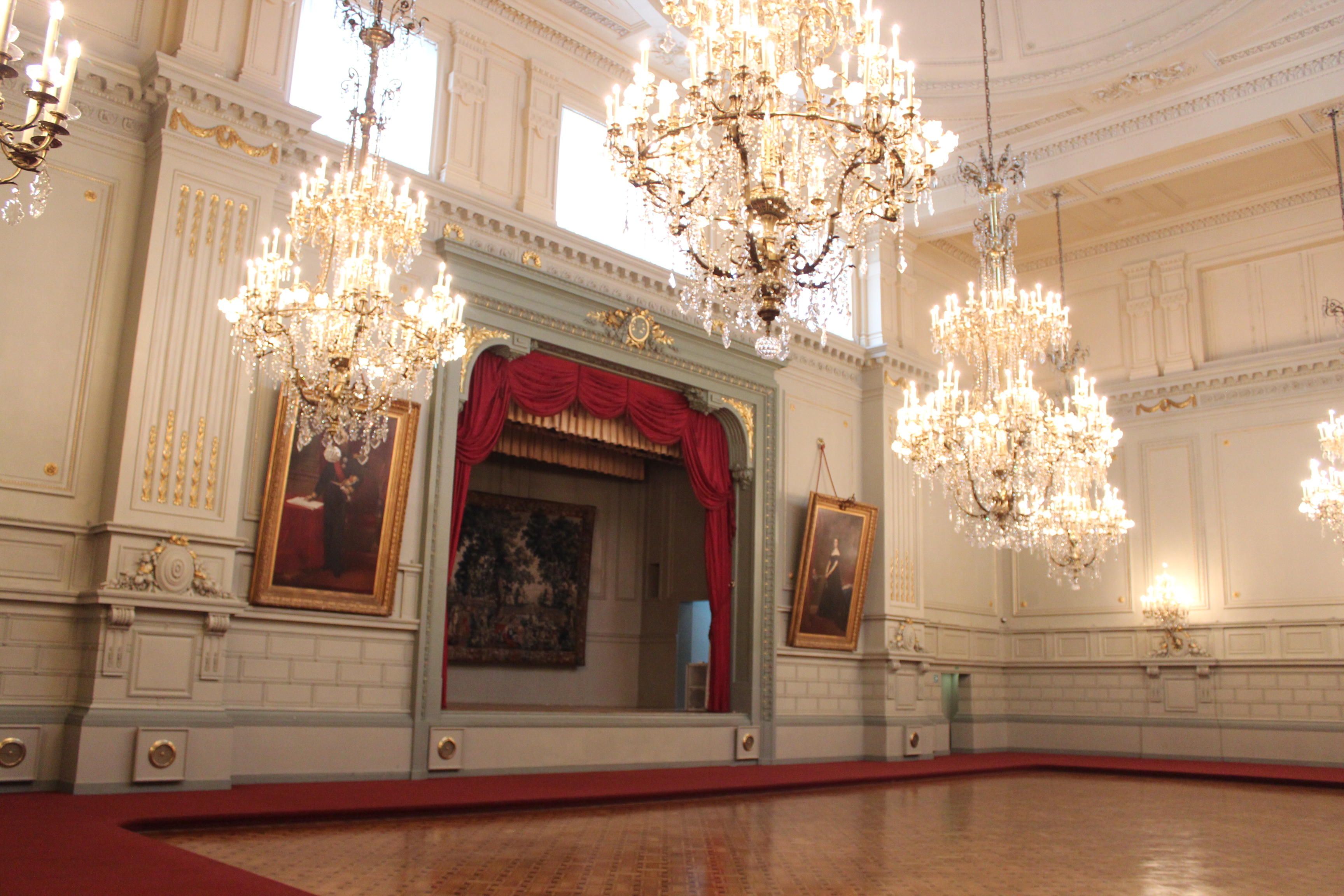 Interieur van het Concert Noble, een neoclassicistisch spektakelzaal, gebouwd 1872-1873 naar plannen van architect Henri Beyaert. Balzaal.